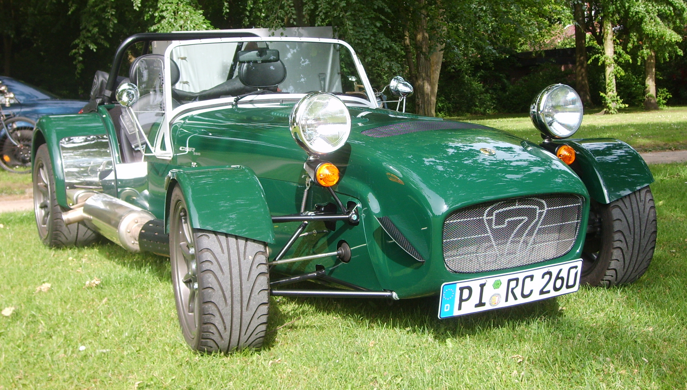 Caterham CSR 260 bei der Pinneberg Mobil